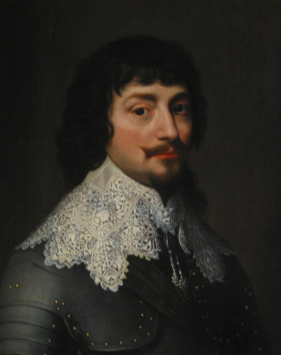 Ölgemälde, Porträt Kurfürst Friedrich V. von der Pfalz. Mit hoher Wahrscheinlichkeit ein Werk von Michiel van Miereveld (1567-1641). Heeresgeschichtliches Museum Native nameHeeresgeschichtliches MuseumLocationViennaCoordinates48° 11′ 07″ N, 16° 23′ 15″ E Established1856Website control VIAF: 149726120 LCCN: n50055593 GND: 2006452-4 BnF: cb11993079q WorldCat